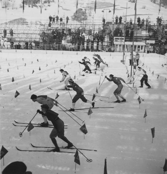 Staffetta femminile di sci di fondo 3x5 km (Cortina 1956)